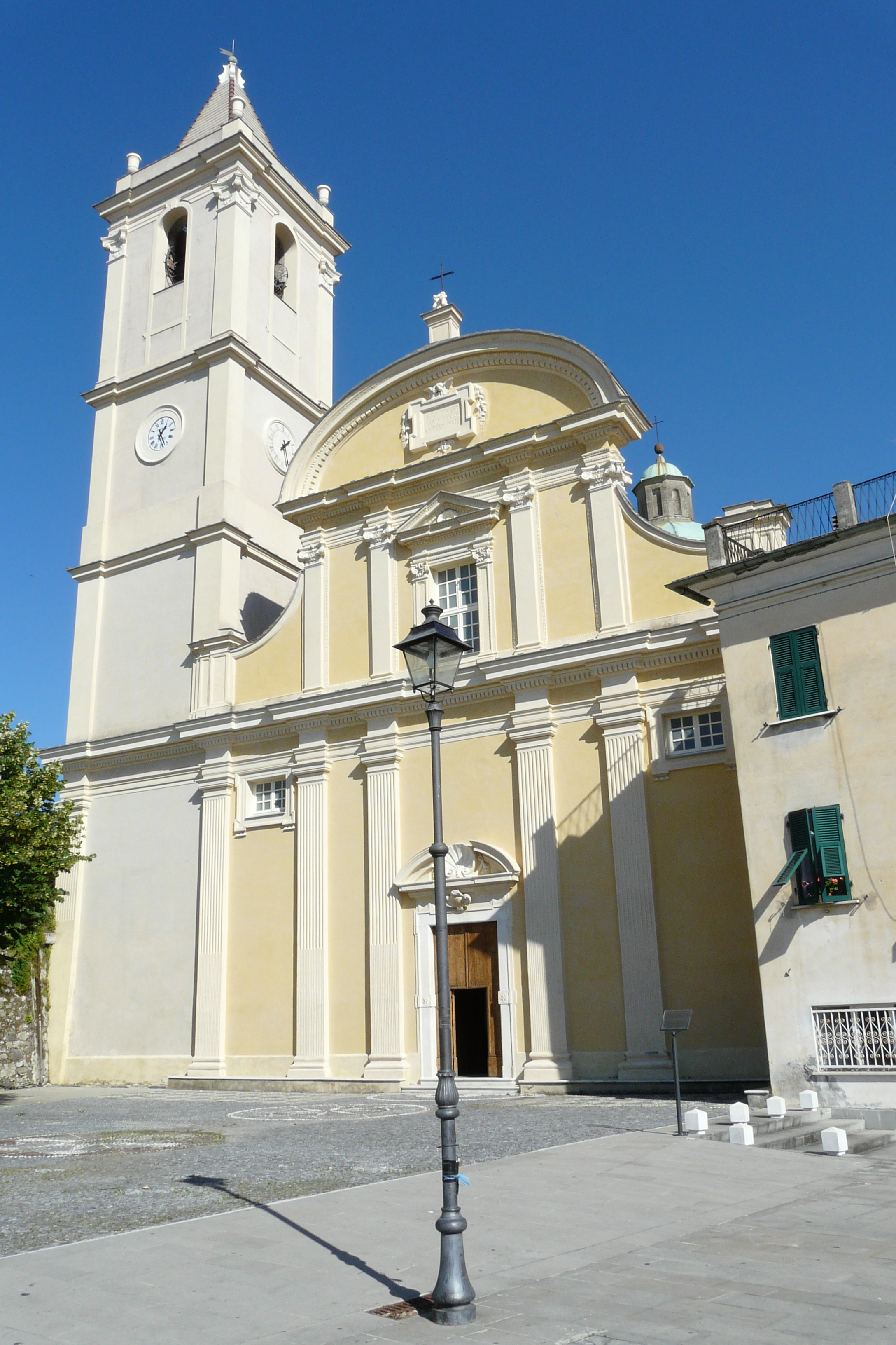 Chiesa dei Santi Sebastiano e Maria Assunta, Vezzano Ligure, Liguria, Italia